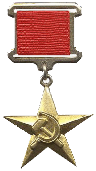 Медаль Серп і Молот